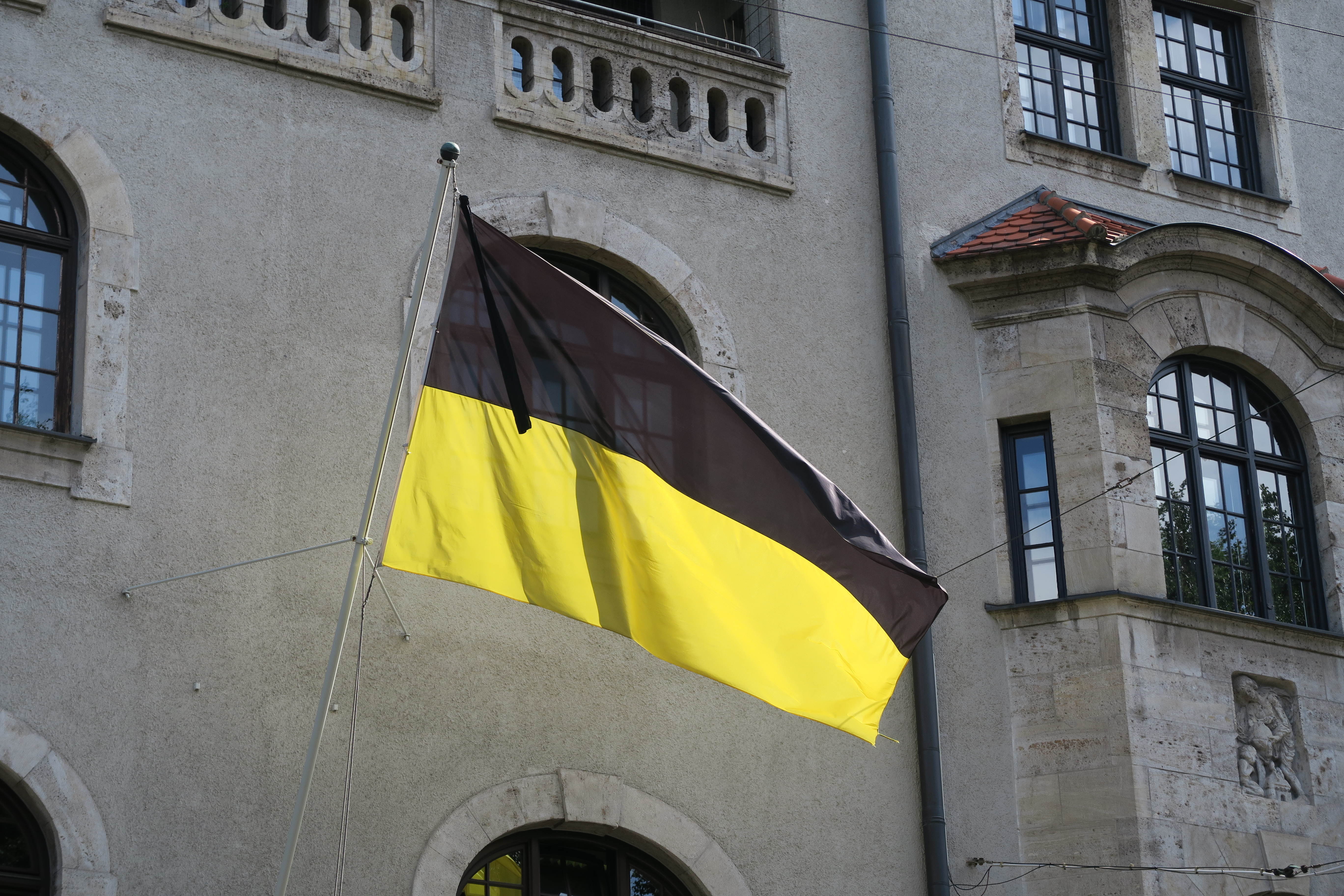 Münchener Flagge mit Trauerflor wegen des Amoklaufs in München am 22. Juli 2016